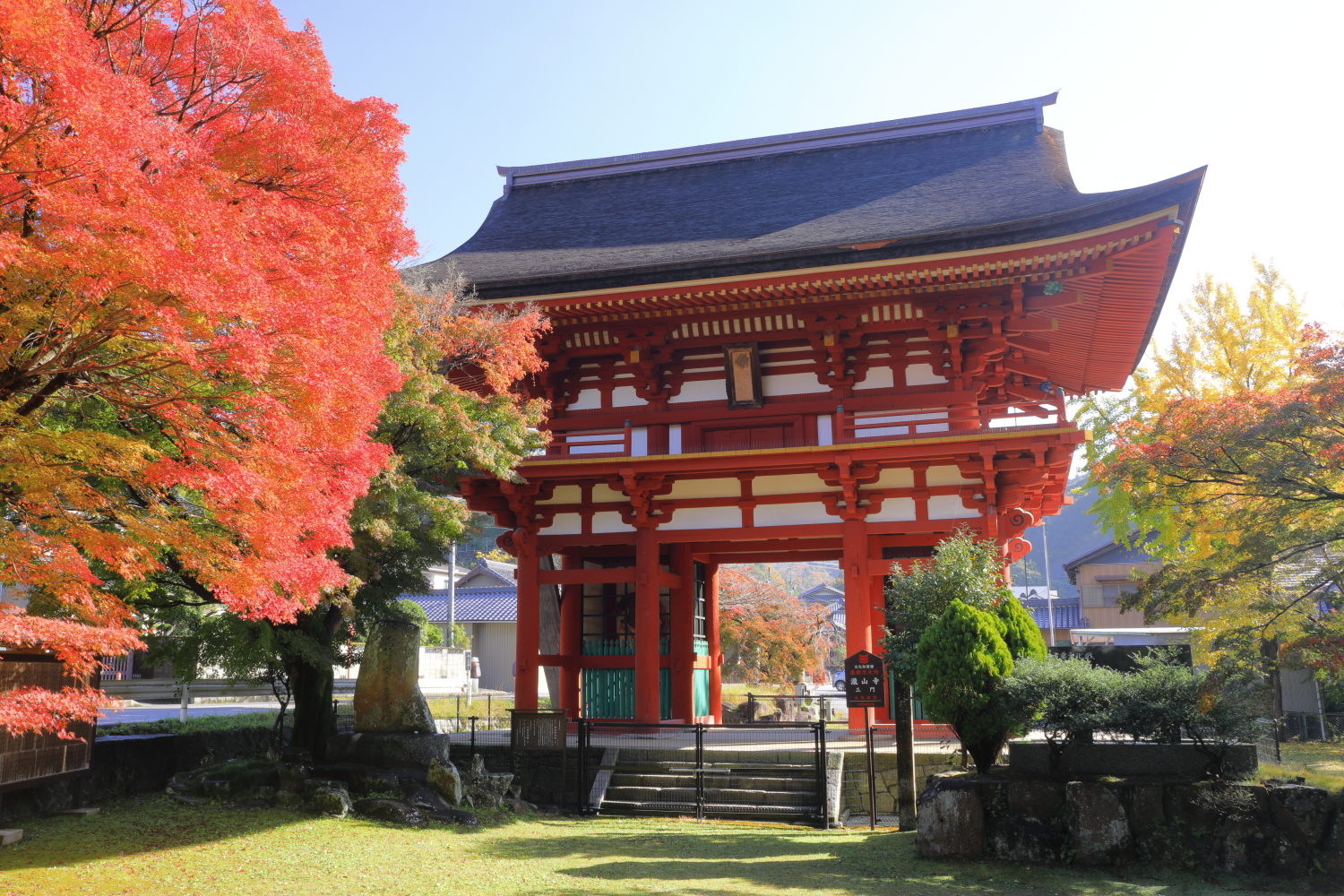 滝山寺三門（2019年（令和元年）11月）